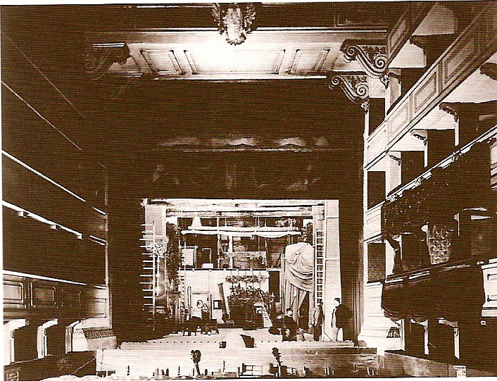 Die Bühne des alten Wiener Burgtheaters am Michaelerplatz / the stage of the old Burgtheater in Vienna at the Michaelerplatz